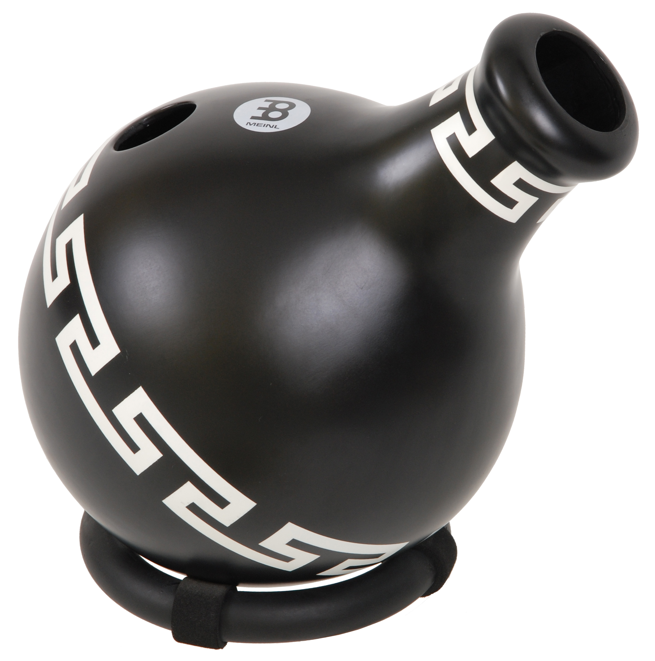 Ibo Drum ID1-BKO firmy Meinl